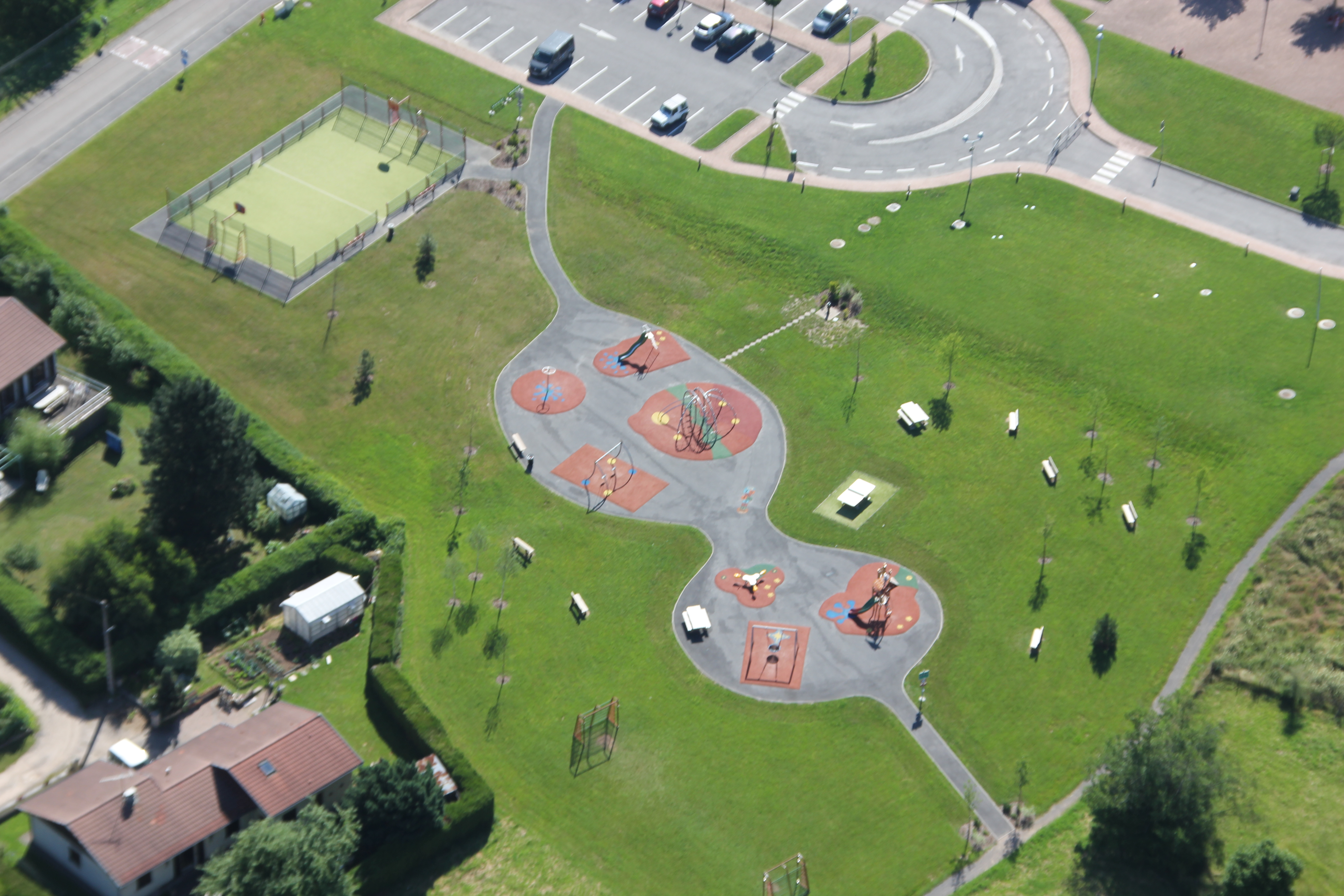 L'aire de jeux et le terrain multisports (depuis juin 2015)